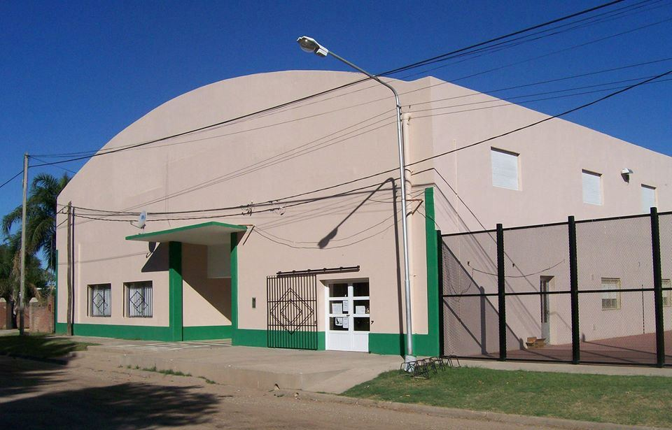 Frente Club Social y Biblioteca Aldao en el año 2012